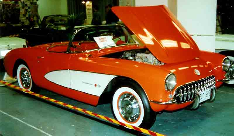 Chevrolet Corvette 1957